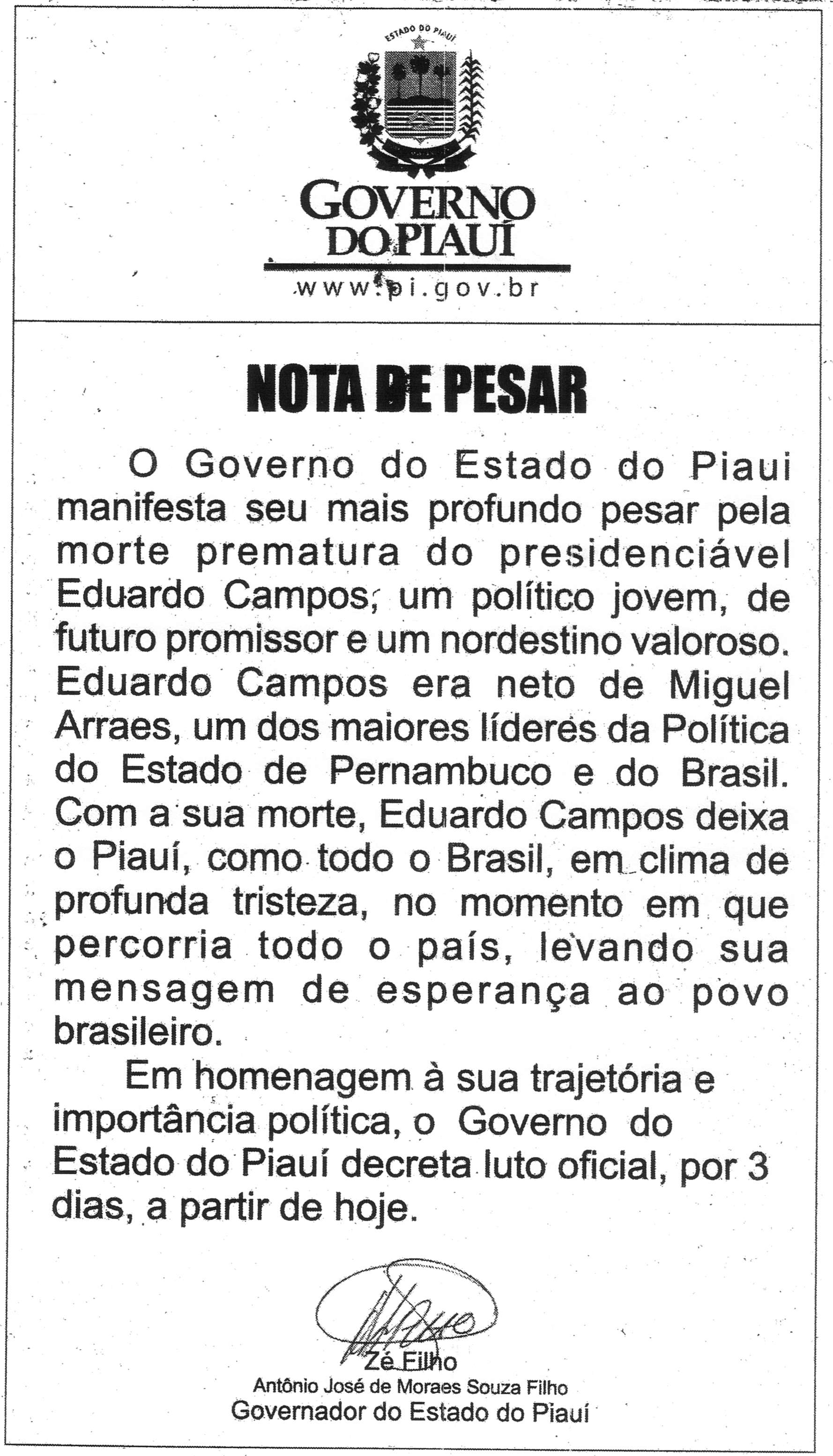 Nota oficial de pesar do Governo do Estado do Piauí pelo falecmento de Eduardo Campos.